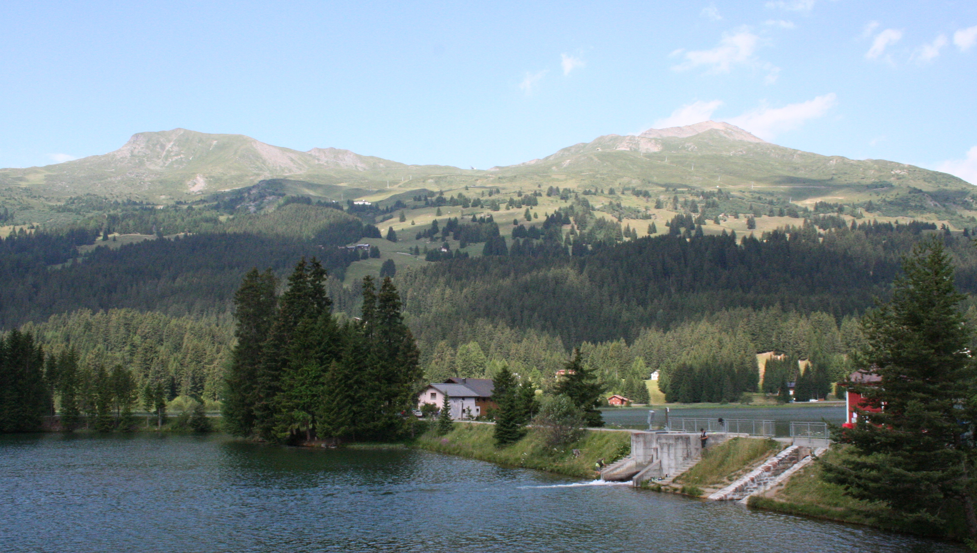 Stätzerhorn (rechts) und Piz Danis (links)